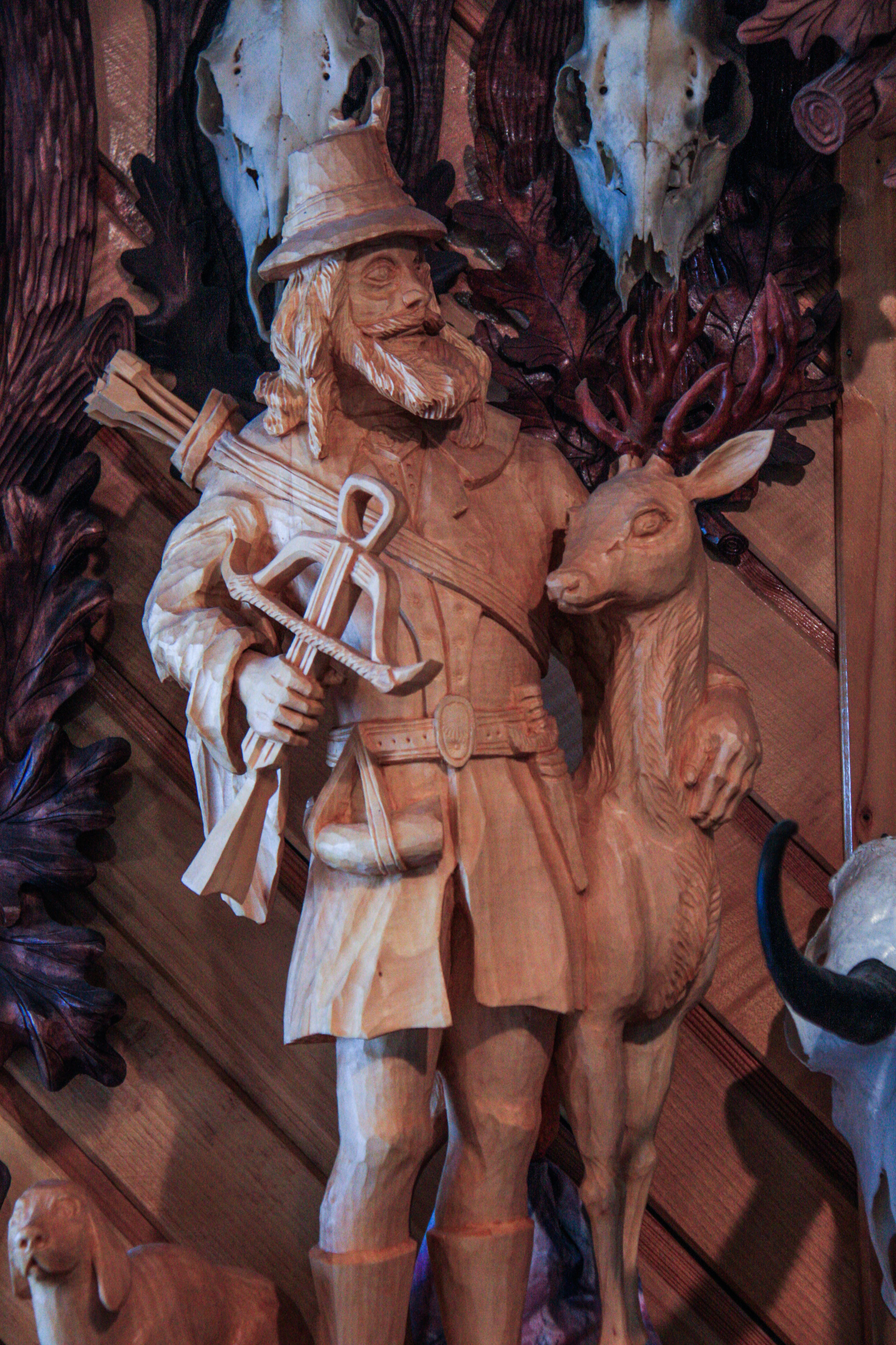 Twórca rzeźby Jan Brlica starszy